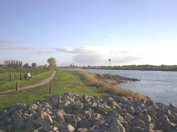 De Gelderse IJssel bij Wijhe